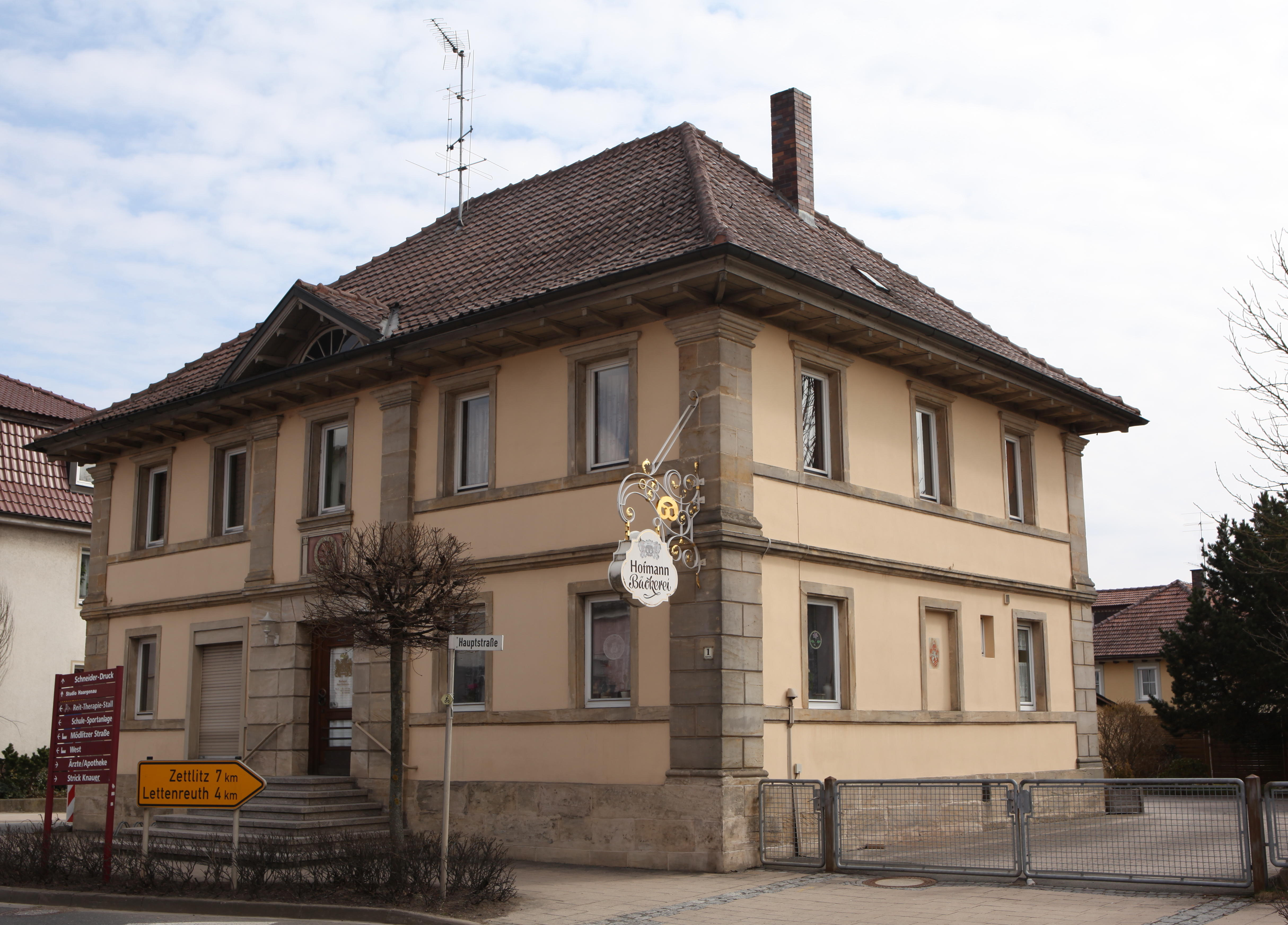 Hauptstr.1 in Weidhausen, Landkreis Coburg